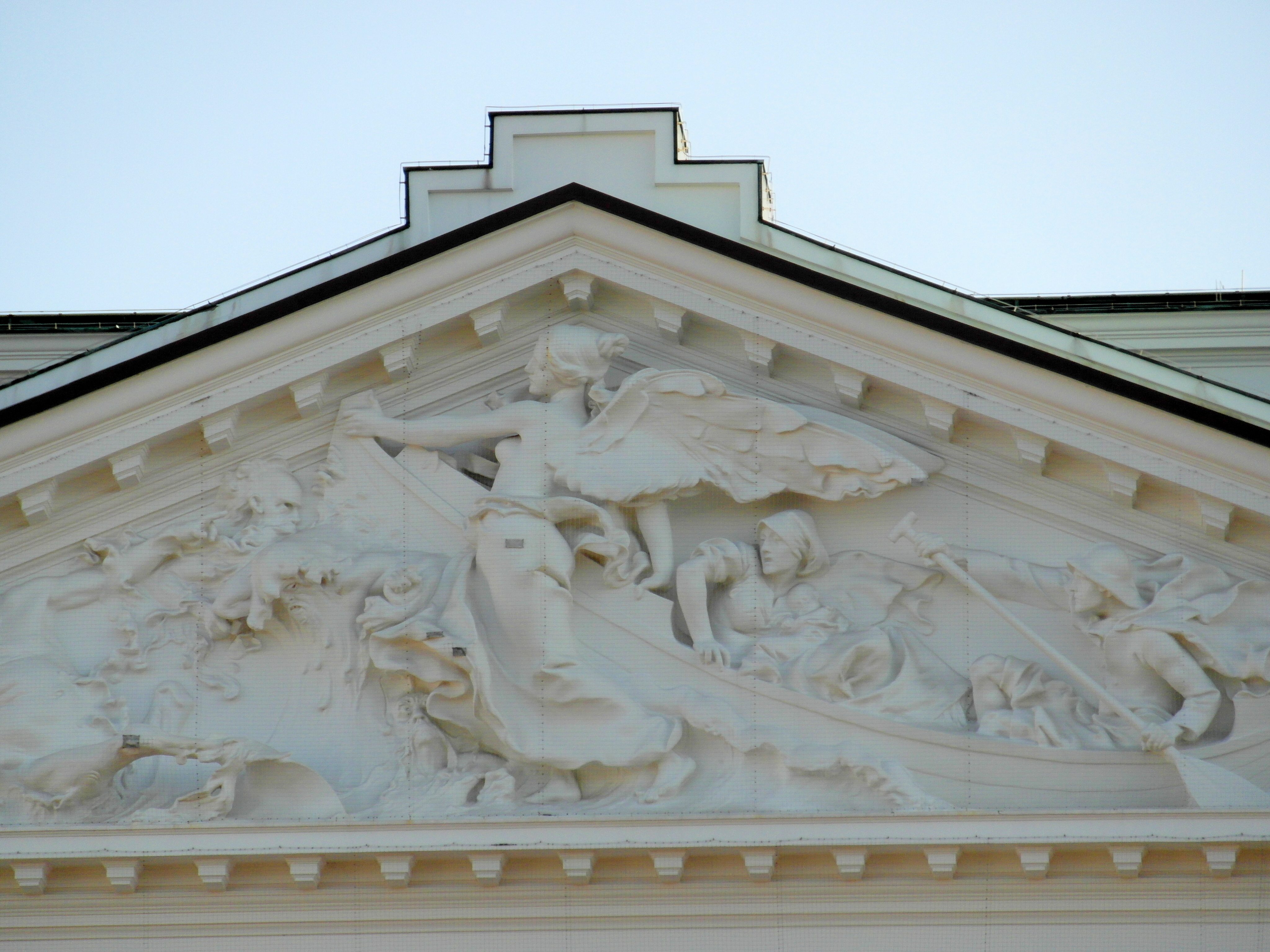 Ein Genius geleitet "das Stadt-Schiff", Gabelrelief. Dieses Werk habe ich auf der Barlach-Seite hinzugefügt. Die genaue Entstehungszeit weiß ich noch nicht.This is a photograph of an architectural monument.